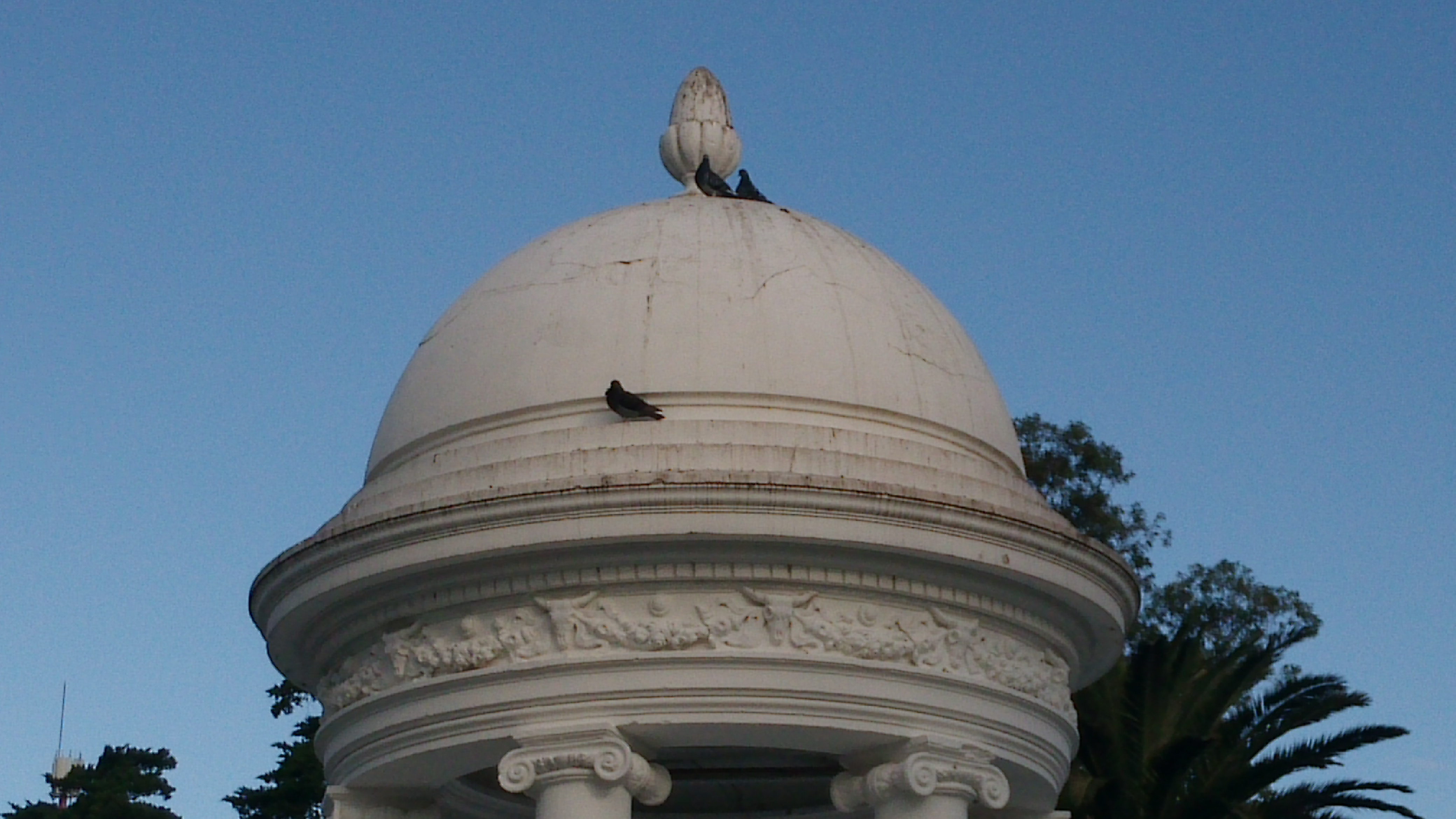 Detalle de la cúpula de la Fuente de Venus con relieves con forma de cráneos de toros en Piriápolis, Maldonado, Uruguay.